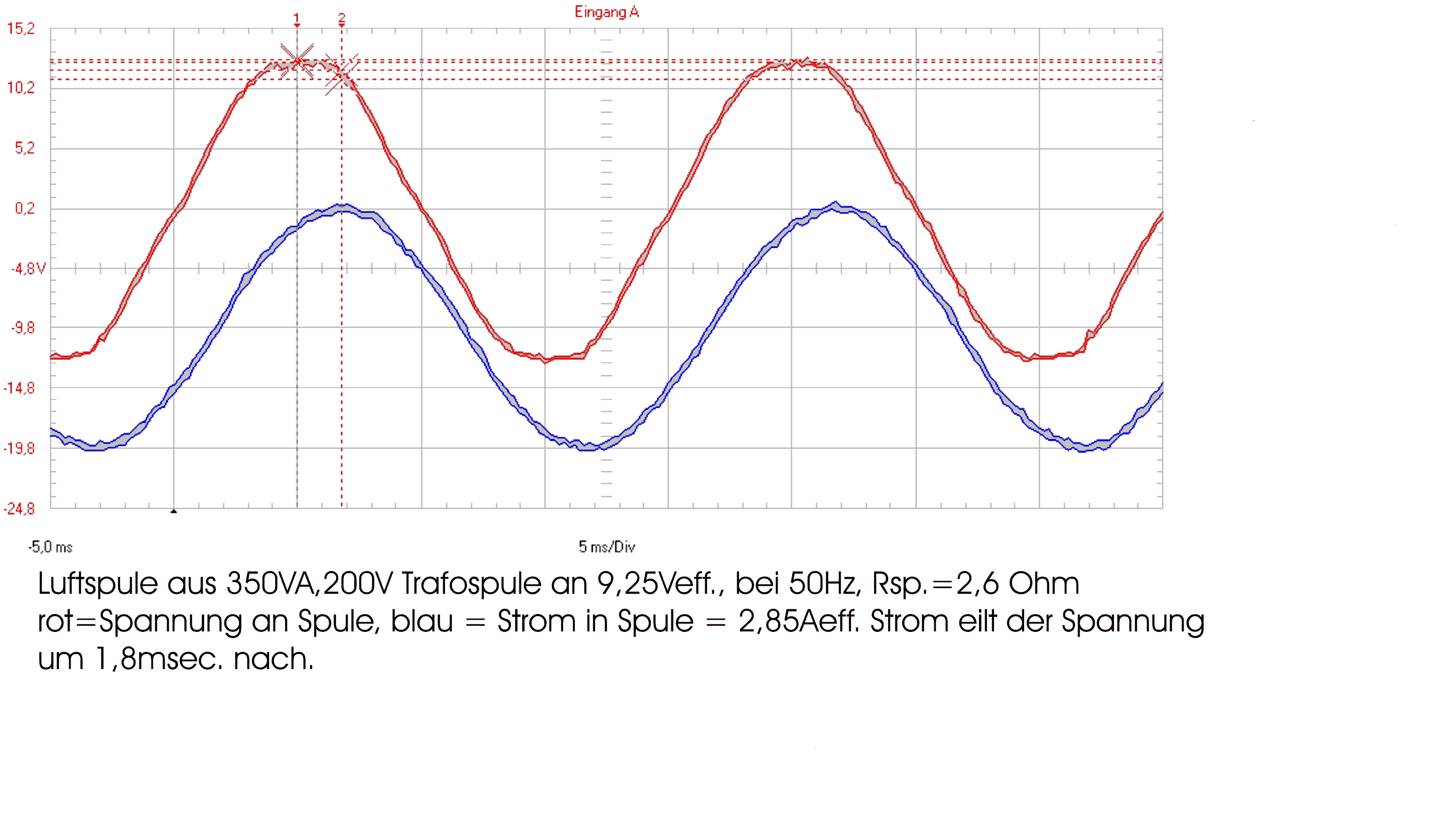 Messungen an Luftspule